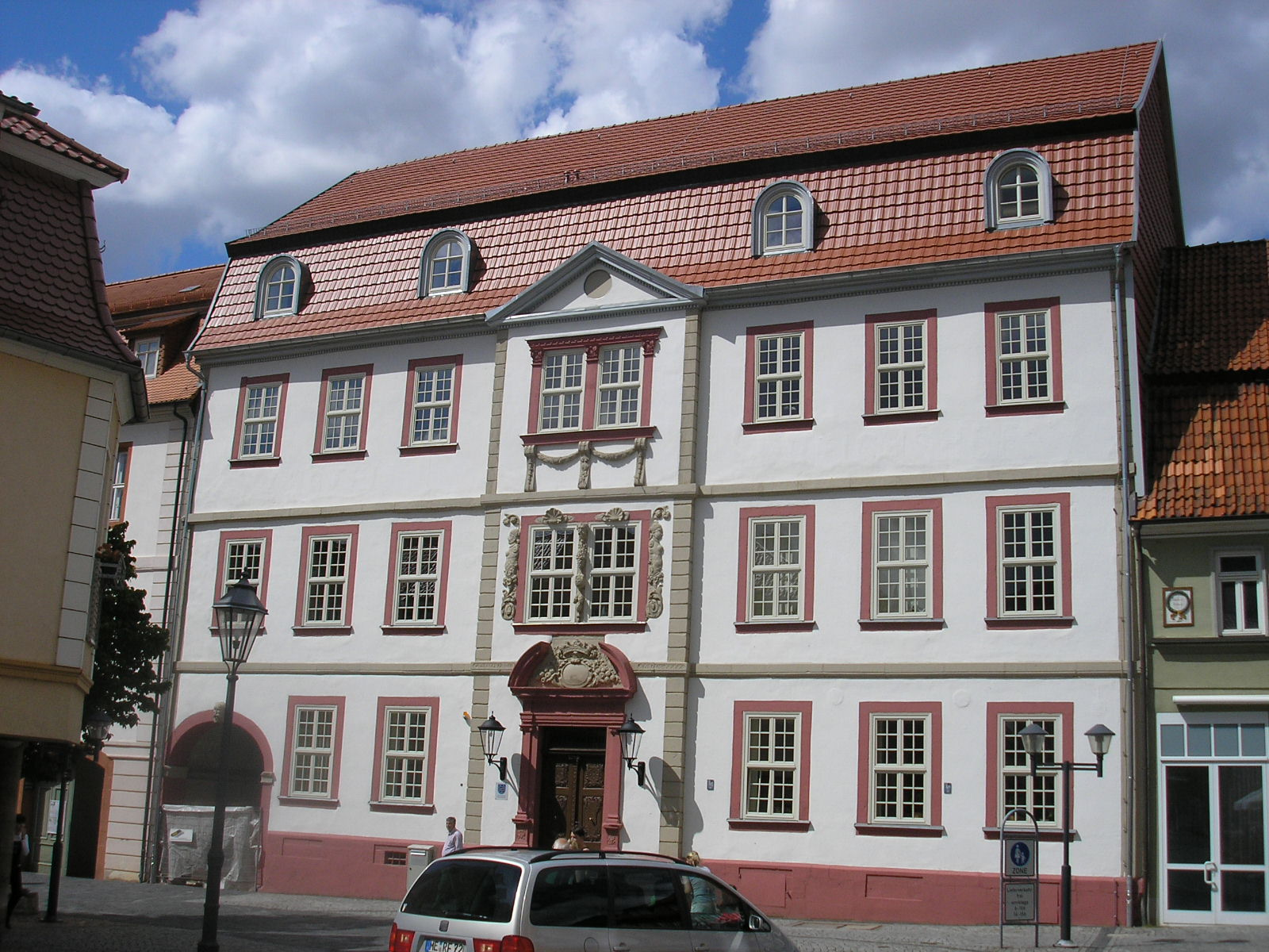 Das Amtsgerichtsgebäude in Heiligenstadt (Thüringen).